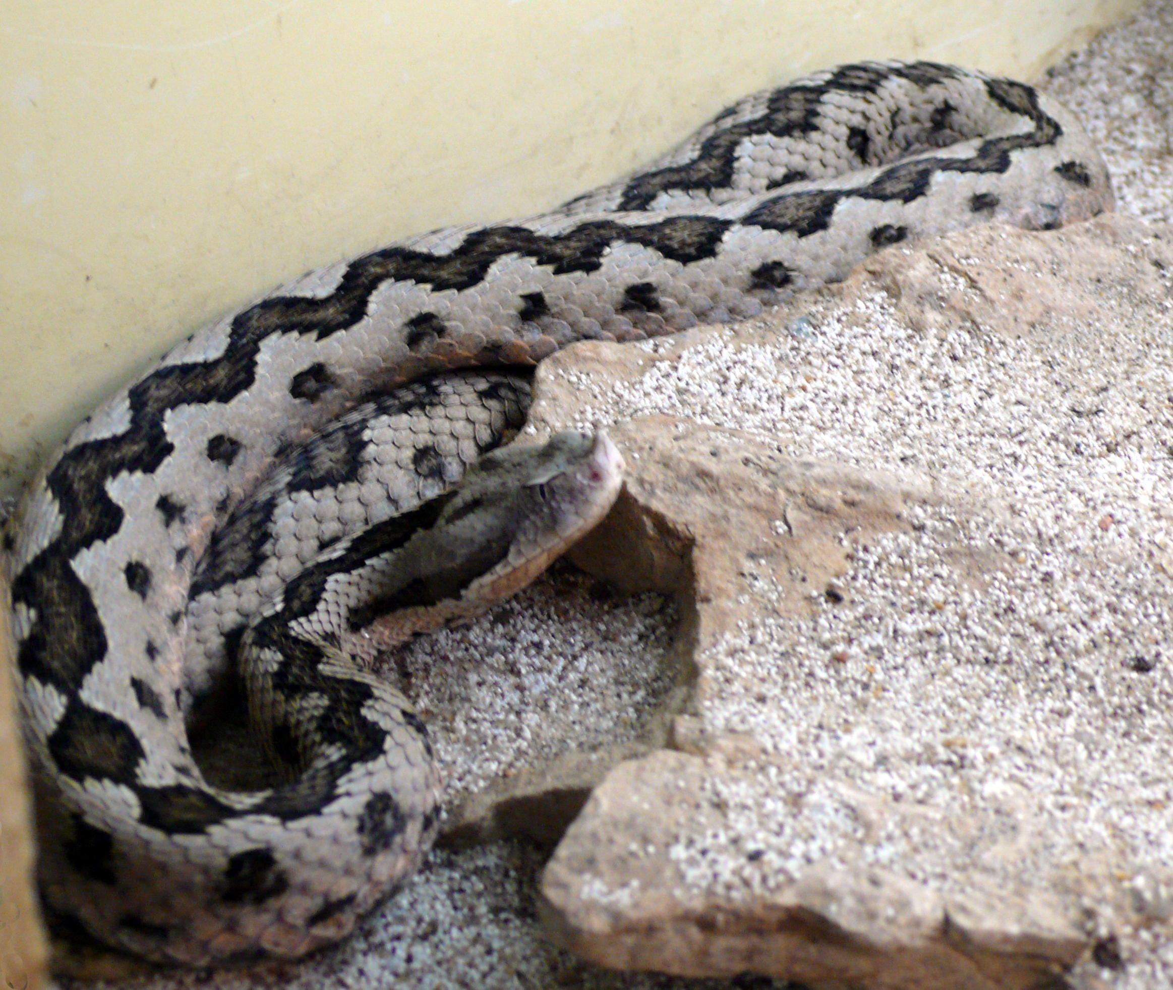 Lataste's viper (Vipera latastei)